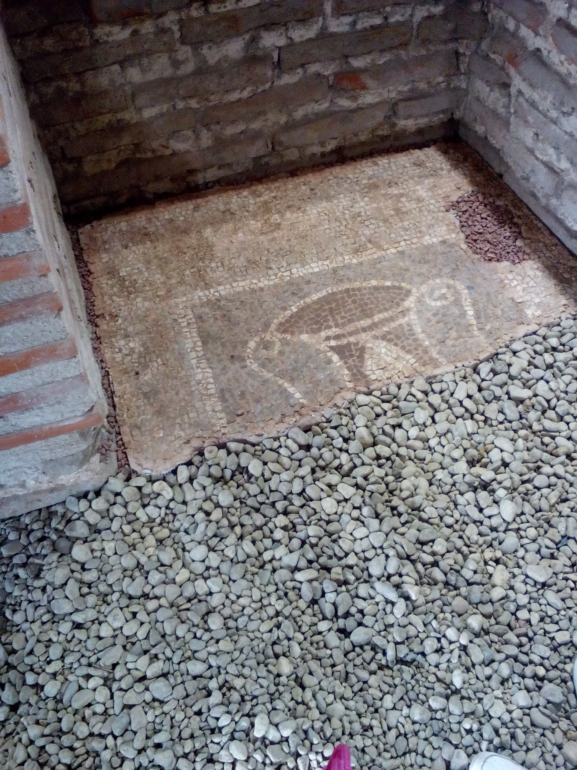 част от мозайка в сграда